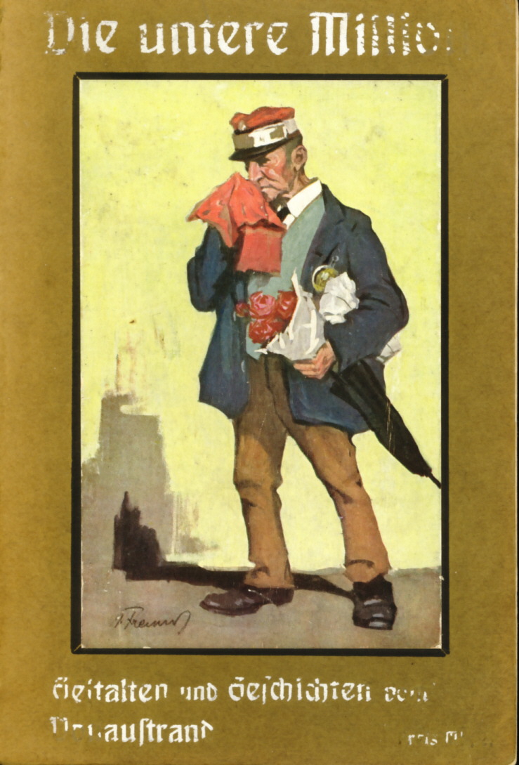 Cover der Buchausgabe Die untere Million von Fritz Stüber-Gunther, Berlin 1910